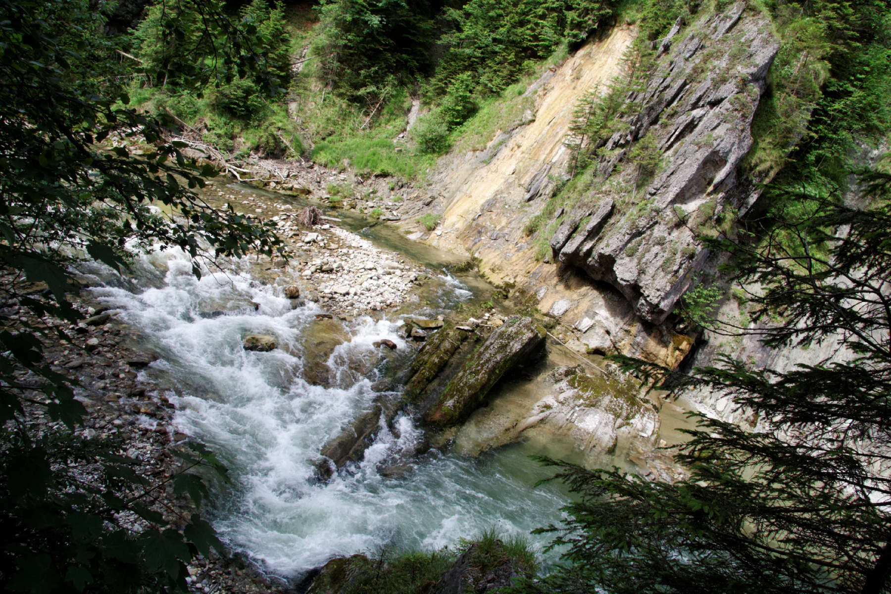 Saulgrub, Ammer am Eintritt in die Scheibum